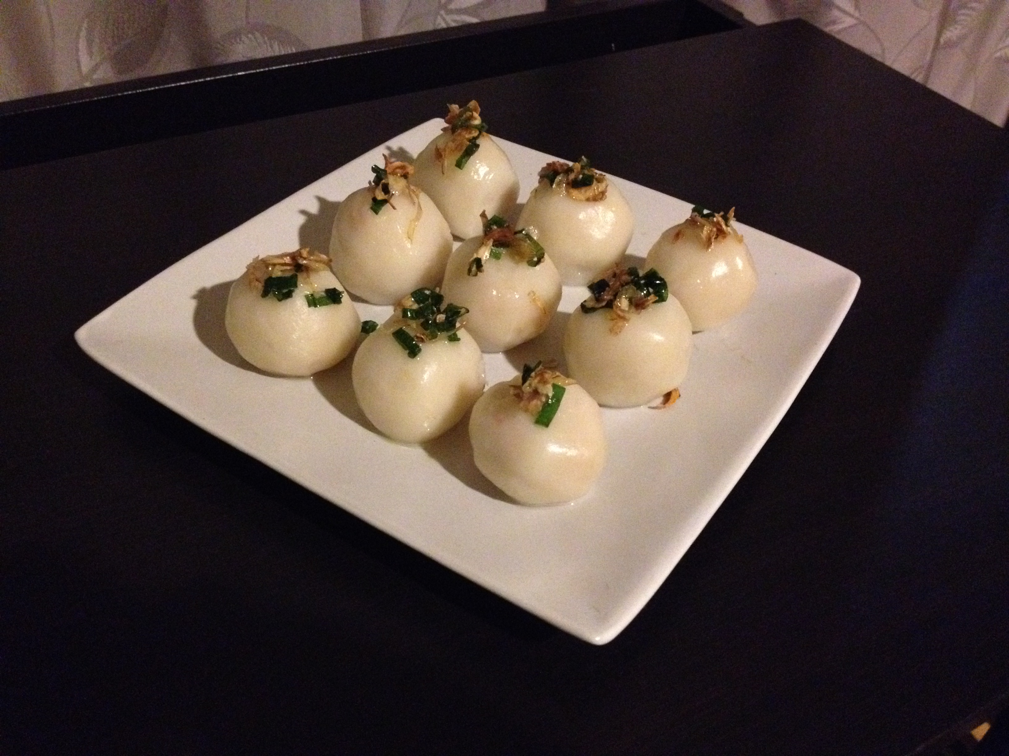 Một đĩa bánh ít trần với hành phi rắc lên trên